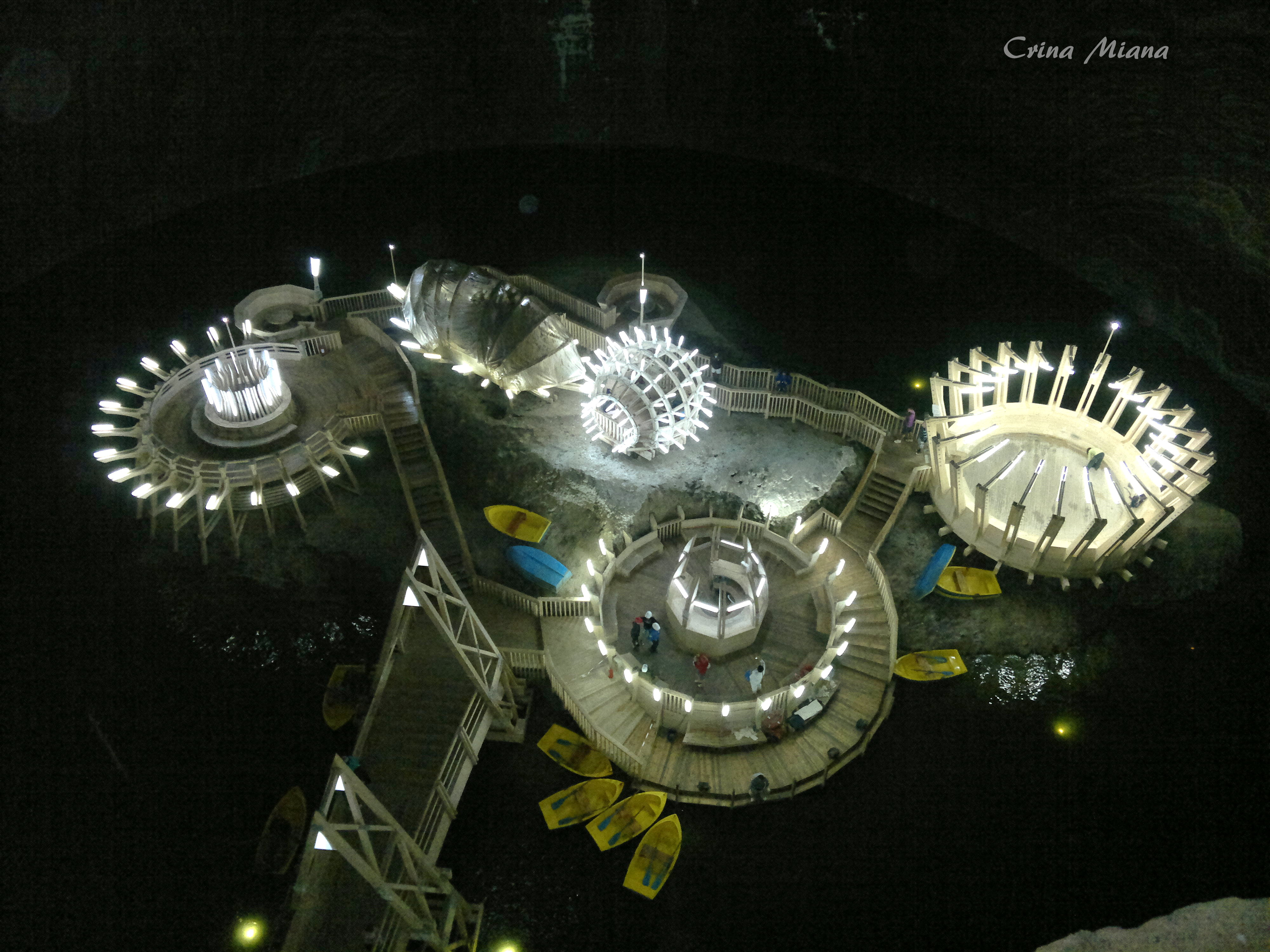 Mina Terezia - Salina Turda